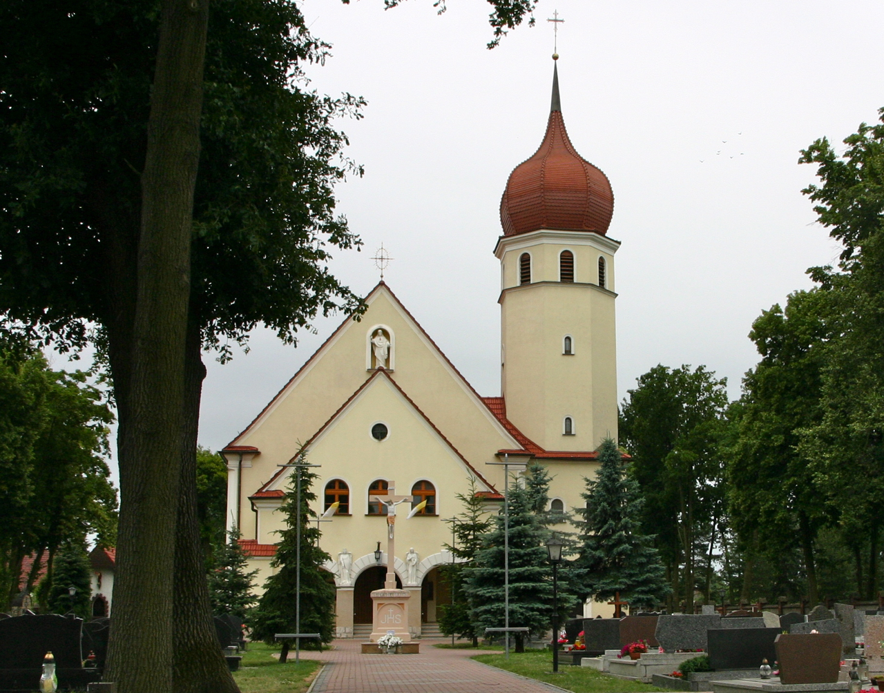 Kąty Opolskie - kościół pw. Najświętszego Serca Jezusowego.